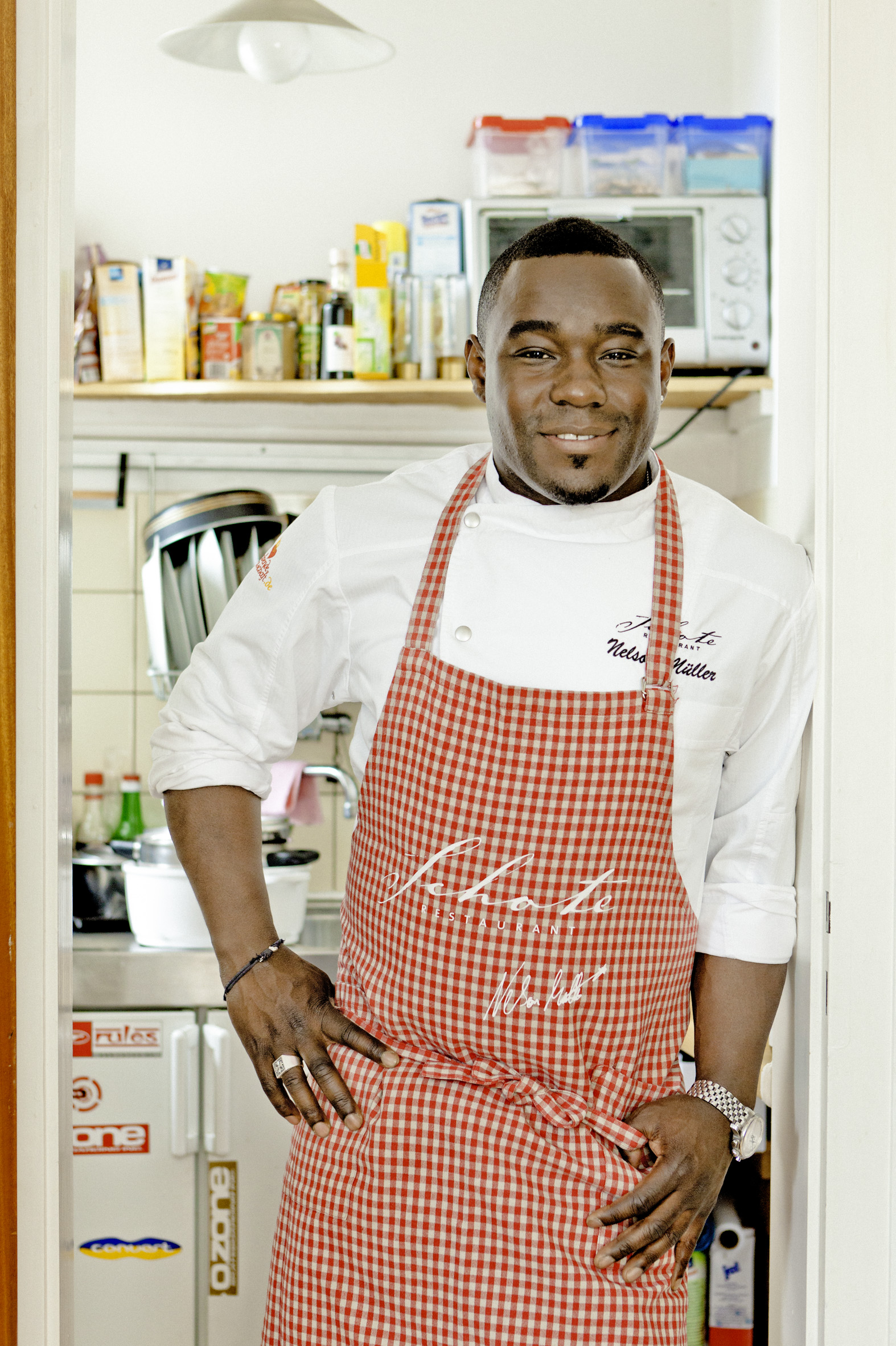 Nelson Müller in seiner privaten Küche